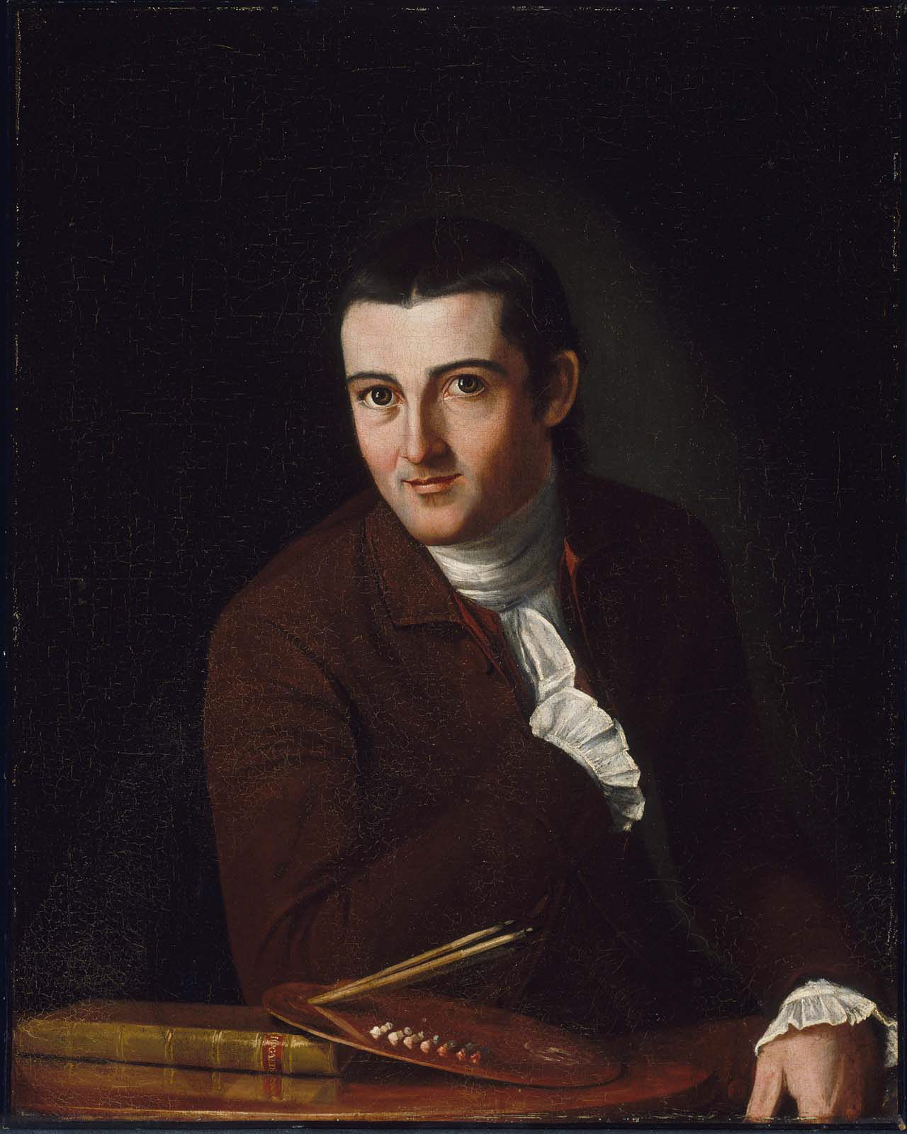 Self-portrait